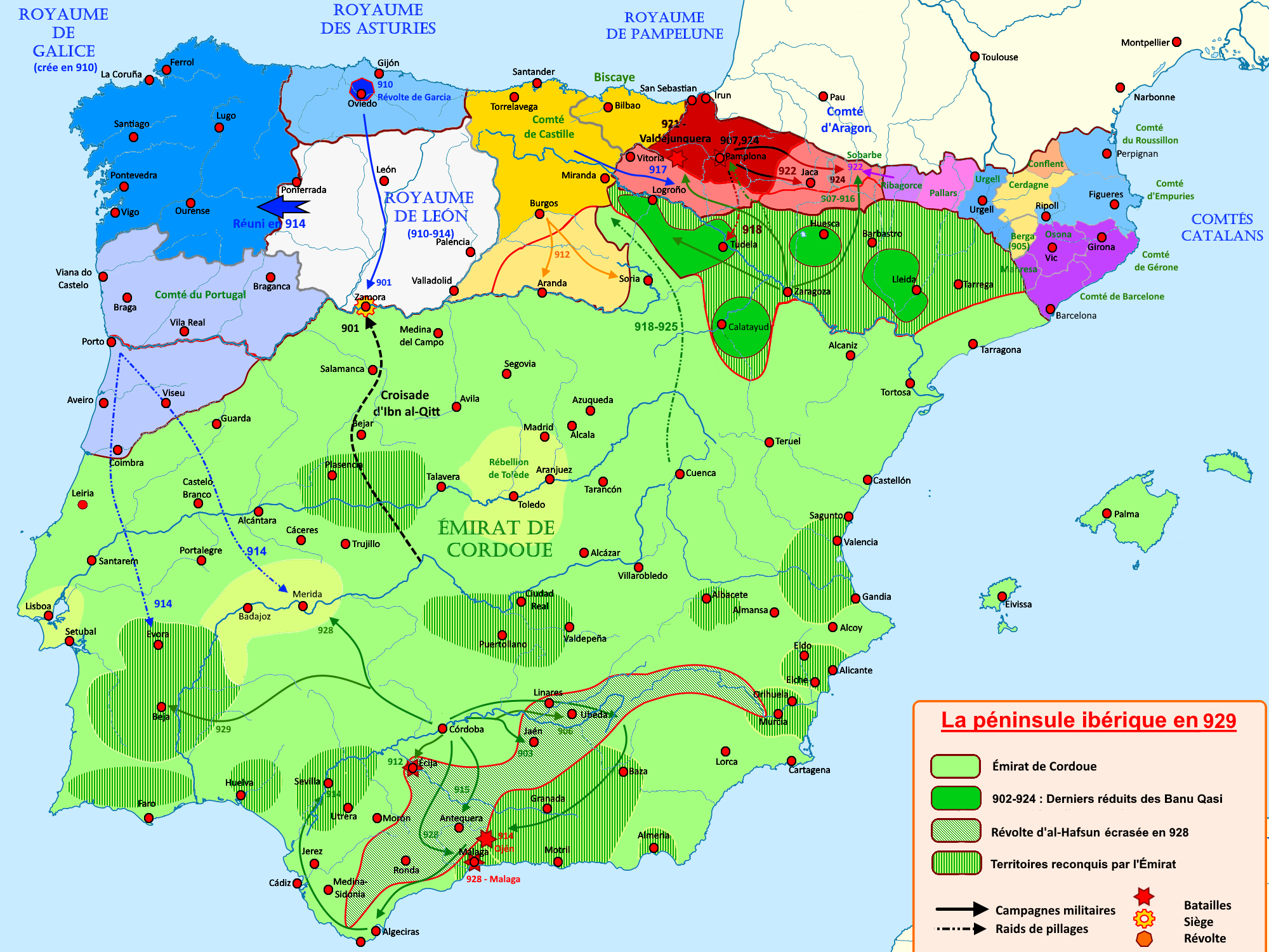 Carte de la péninsule ibérique de 900 à 950 avec les principaux évènements de la période.